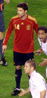 Alonso grający w reprezentacji Hiszpanii w meczu z Anglią